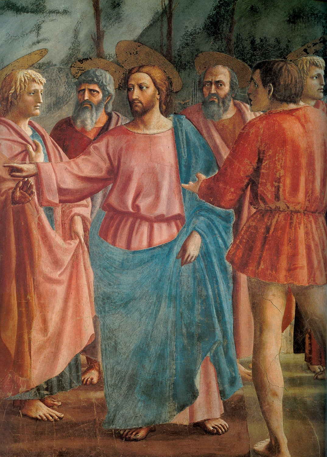 Freskenzyklus der Brancacci-Kapelle in Santa Maria del Carmine in Florenz, Szenen aus dem Leben Petri, Szene: Der Zinsgroschen, Detail: Petrus und Christus